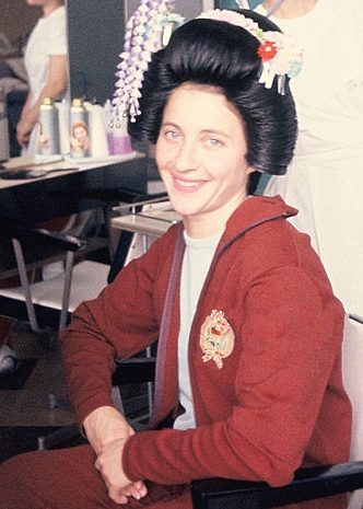 Lídia Sákovicsné Dömölky at the 1964 Olympics